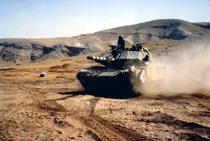 taken by שלמה